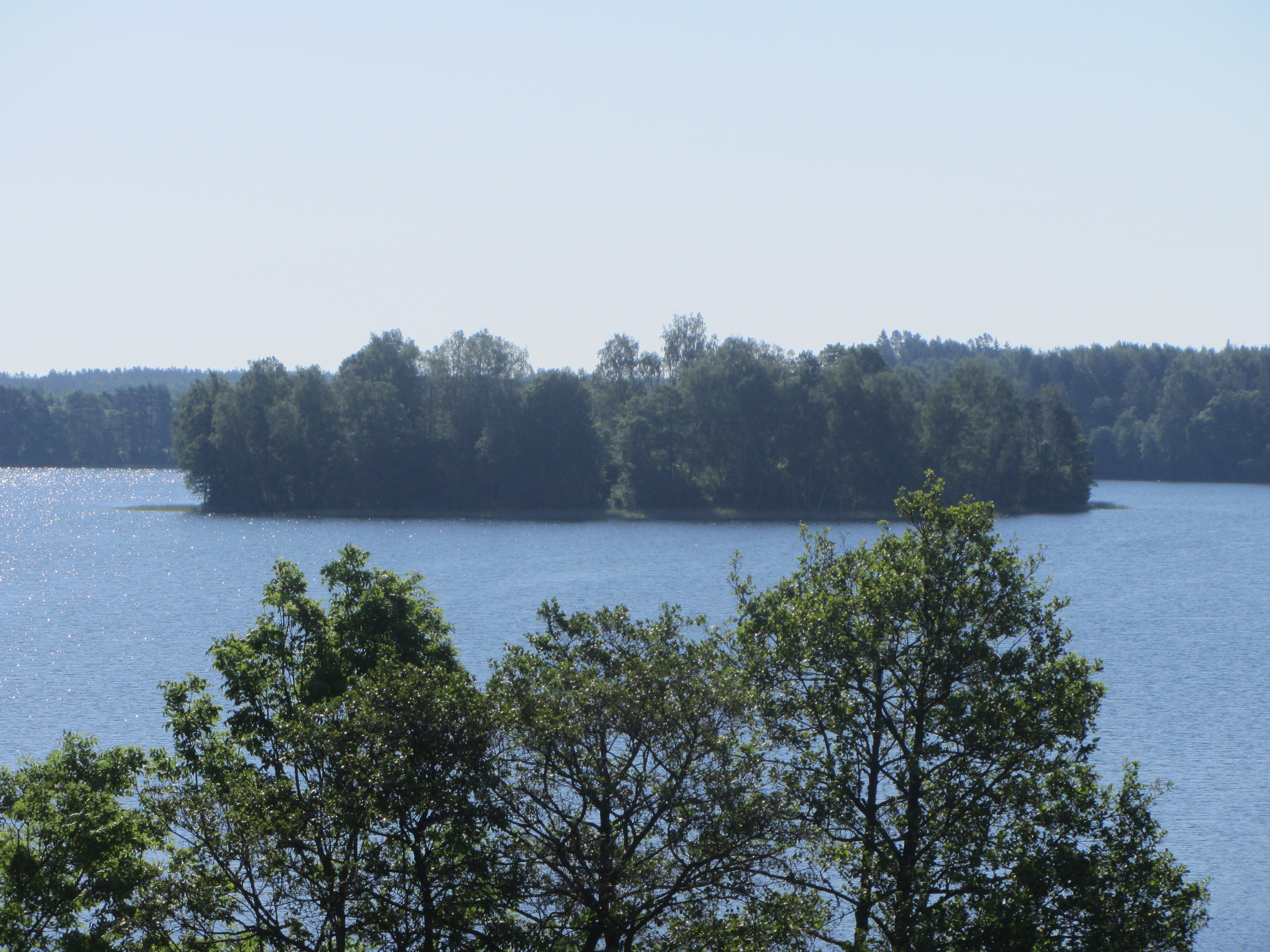 Dusetų sen., Lithuania